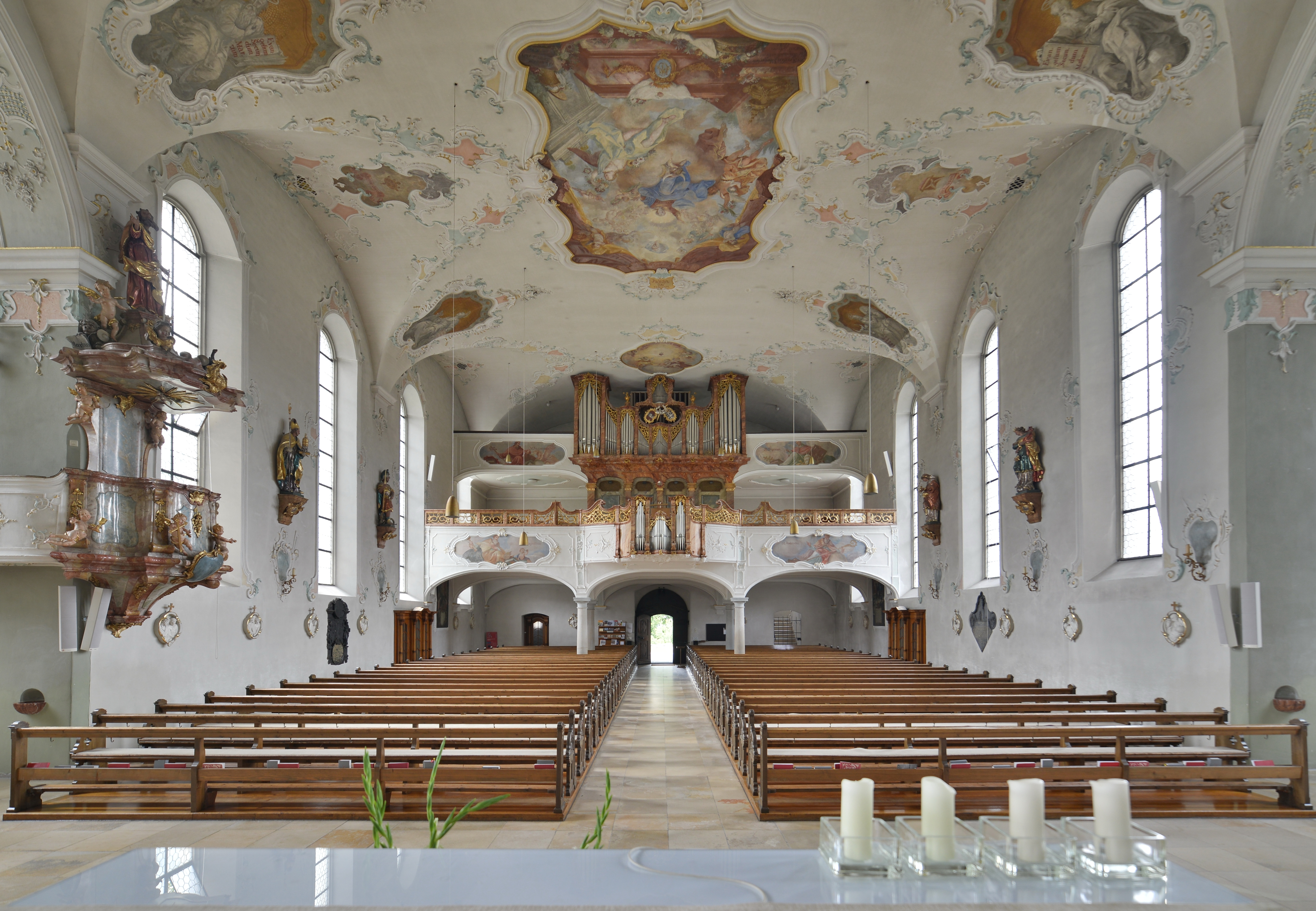 Innenraum der Stadtpfarrkirche St. Gallus in der Oberstadt von Bregenz. *** Veröffentlicht: Alois Niederstätter in "Geschichte Vorarlbergs Band 2 Vorarlberg 1523 bis 1861 Auf dem Weg zum Land ISBN 978-3-7030-0864-1 2015